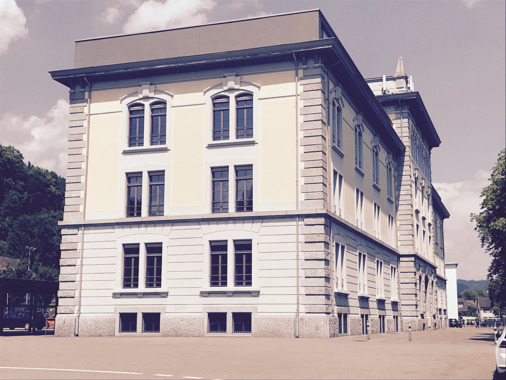 Kaserne